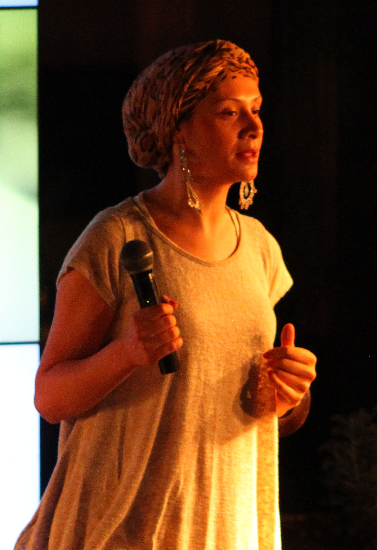 Мариана Николова Попова - българска поп-певица, известна най-вече с участието си на Евровизия.